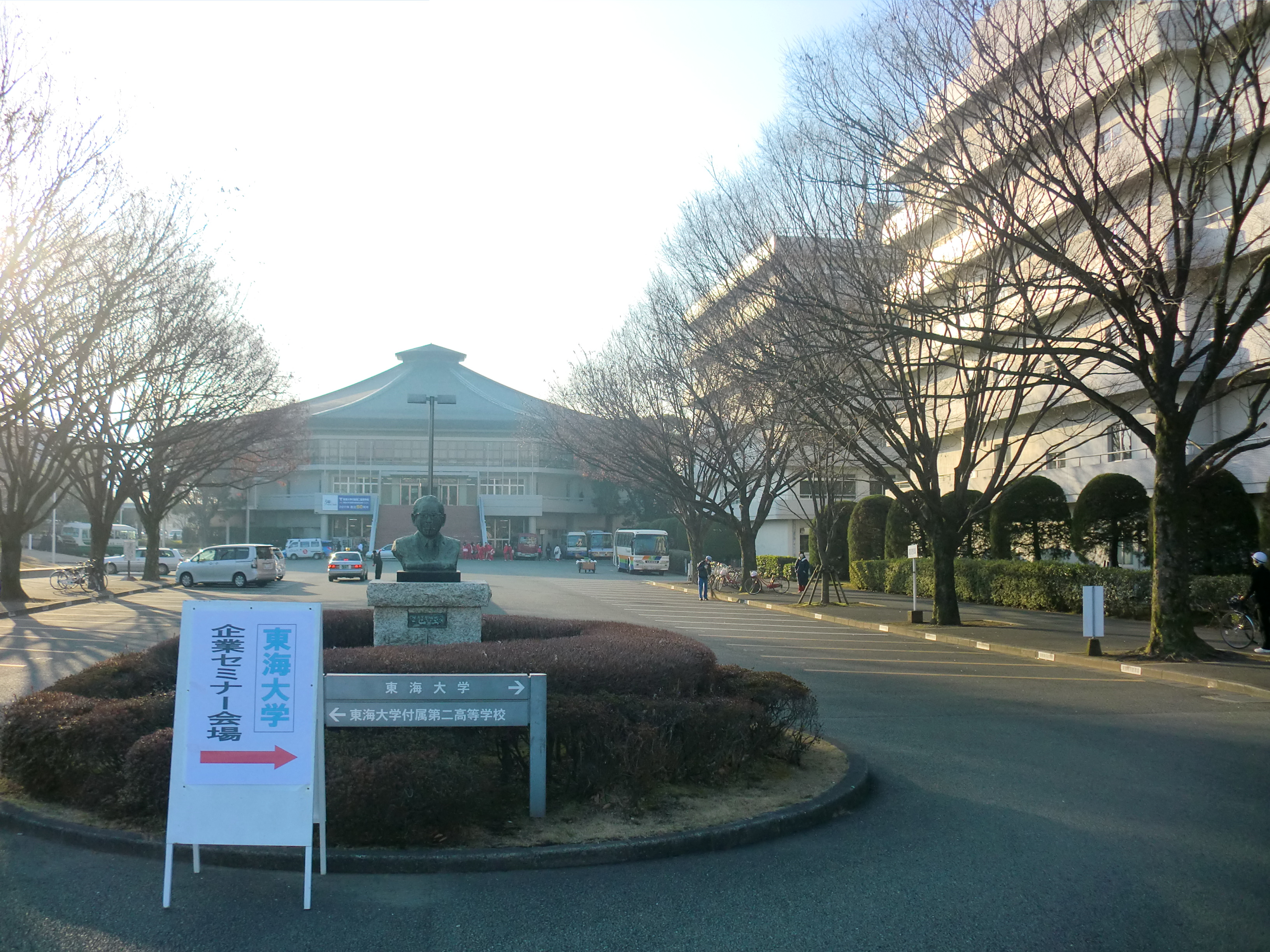 熊本市東区にある東海大学熊本キャンパス